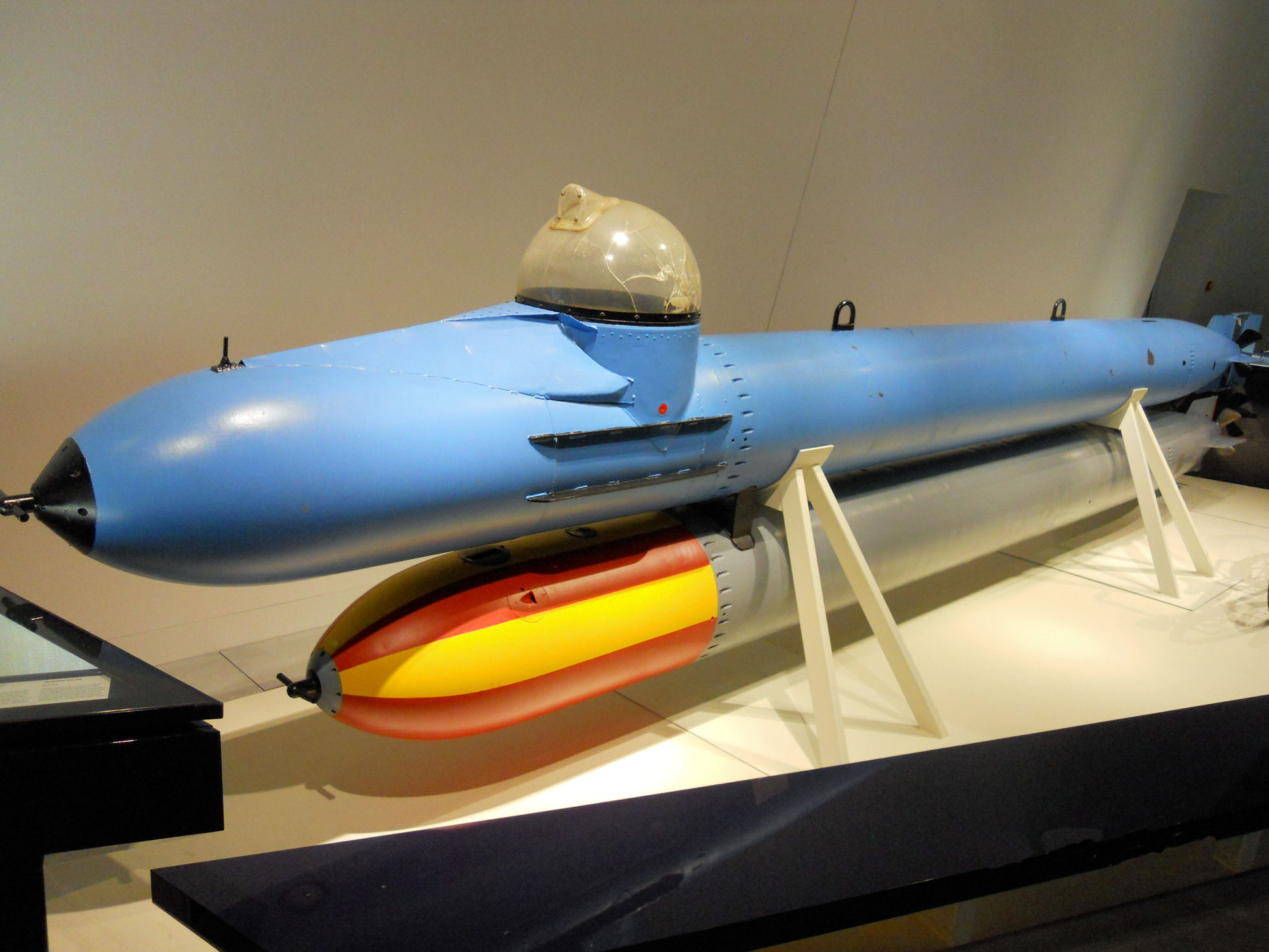 dt. Klein-Uboot Marder